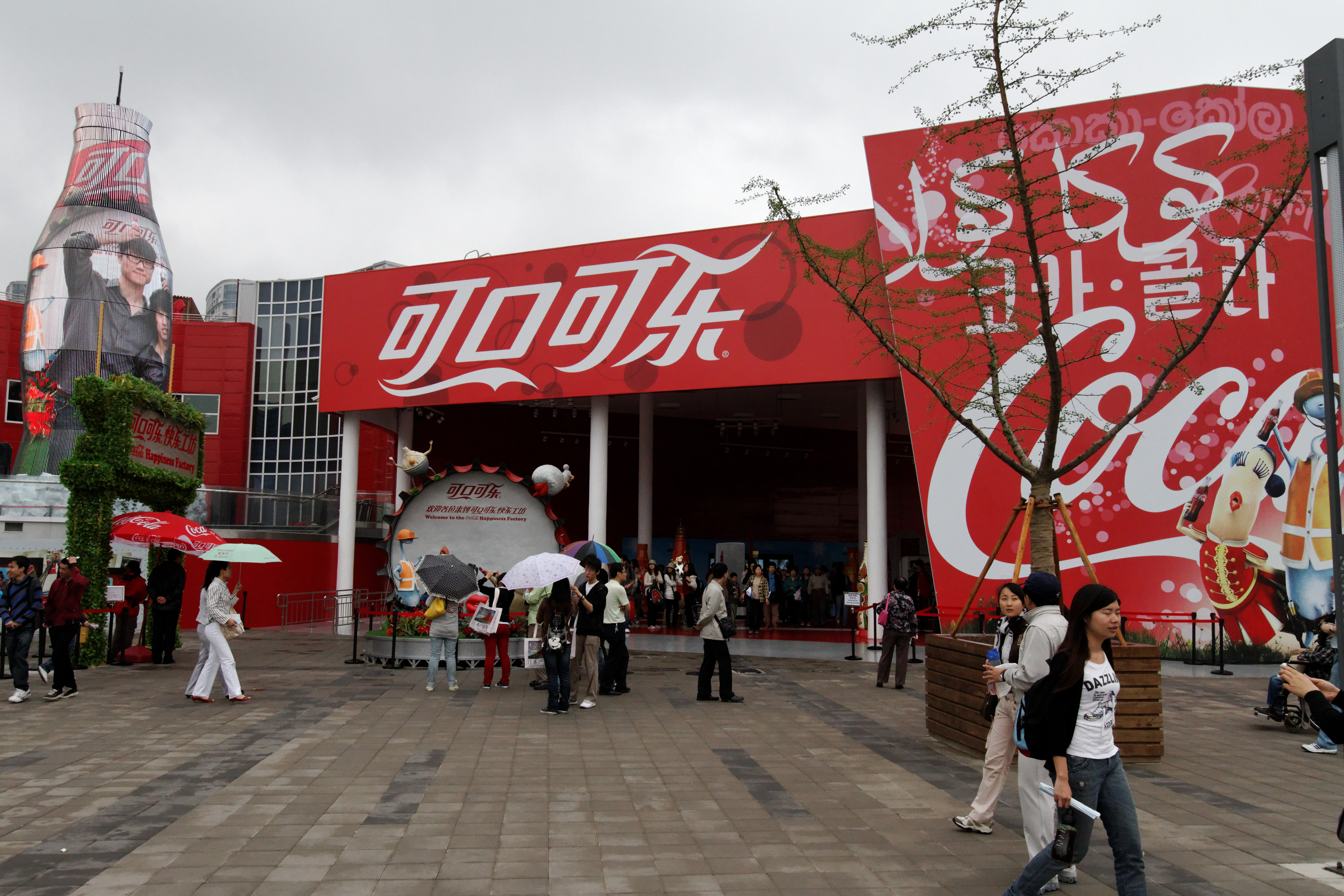 Coca-Cola Pavilion, main entrance, Expo 2010